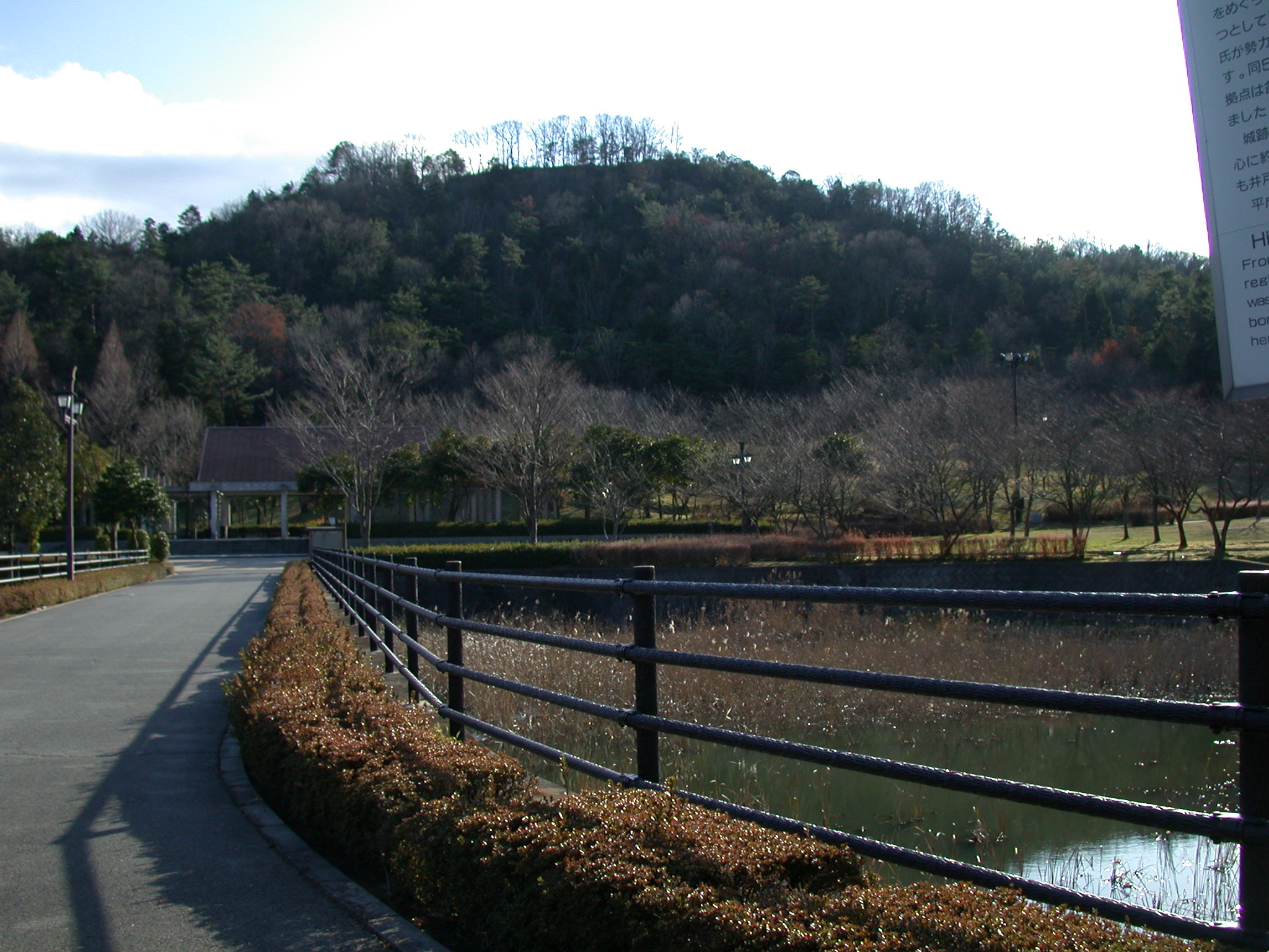 Kagamiyama Castle